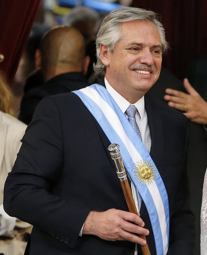 Alberto Fernández y Cristina Fernández de Kirchner, tras asumir como presidente y vicepresidenta de la Nación Argentina.